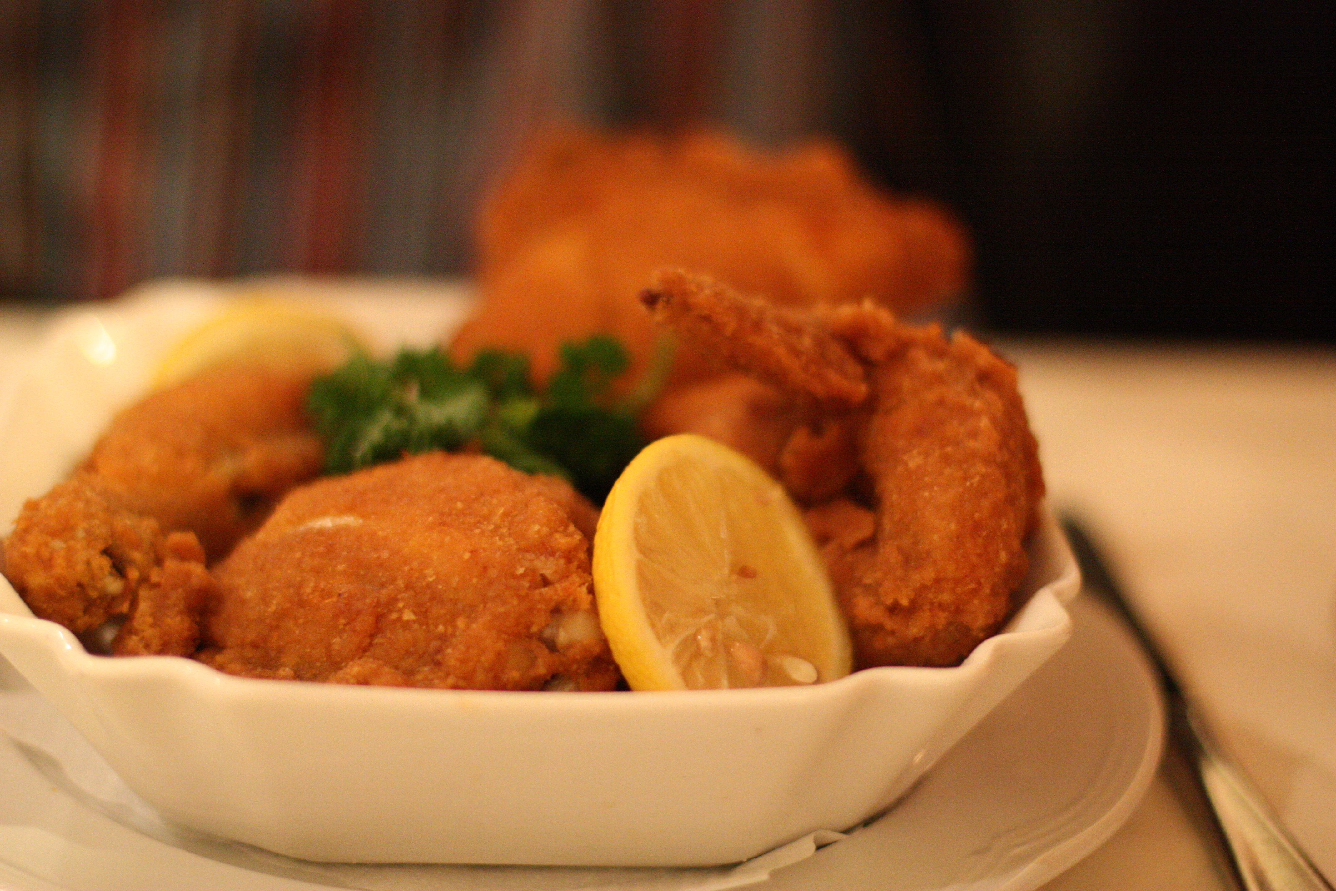 Backhendl, Wien, 2009